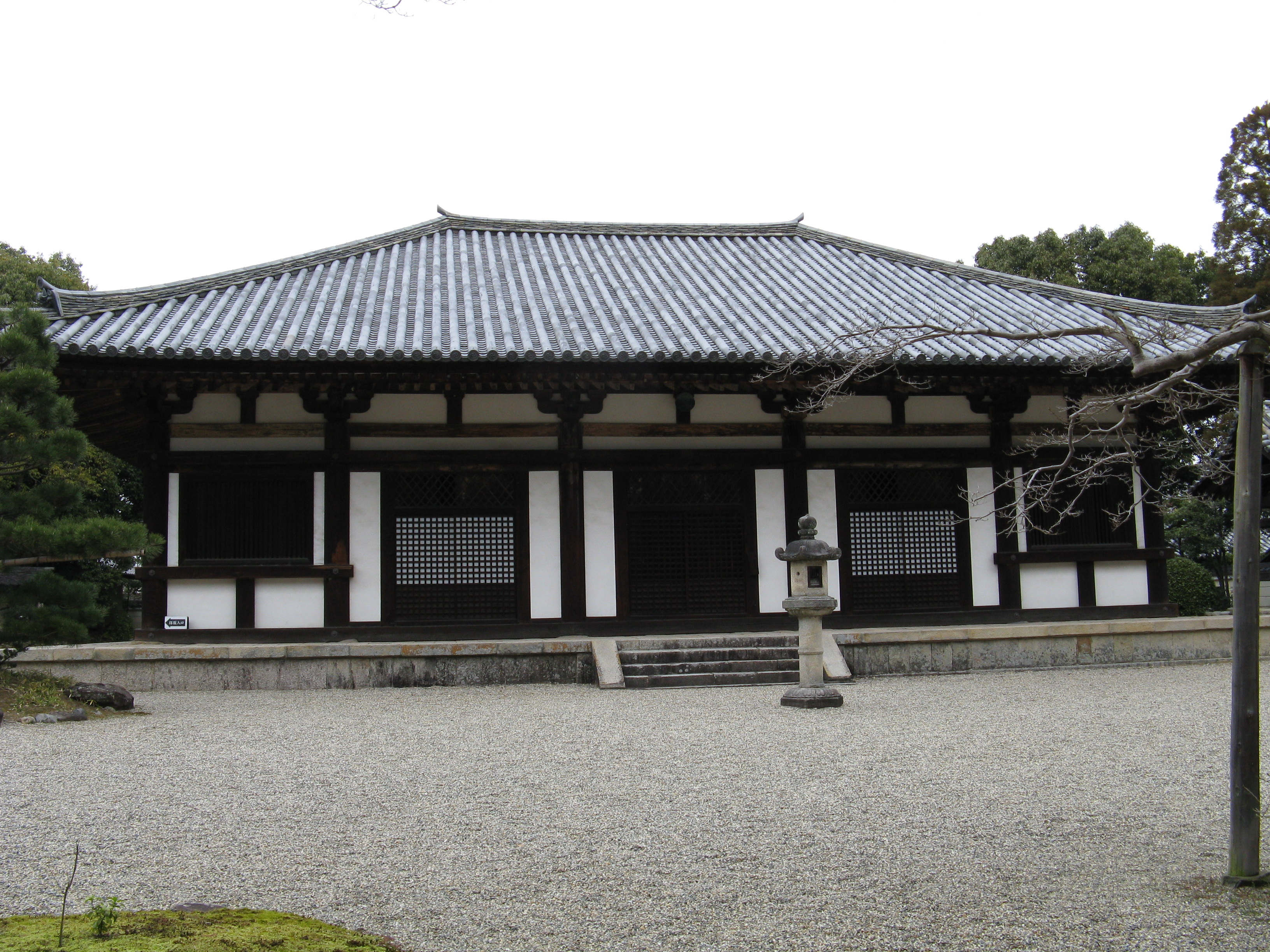 秋篠寺 本堂